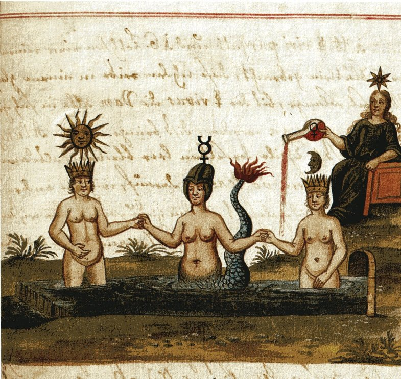 Immagine del manoscritto Zoroaster Clavis Artis, MS. Verginelli-Rota, Biblioteca dell'Accademia Nazionale dei Lincei, Roma, vol. 2, pag. 121